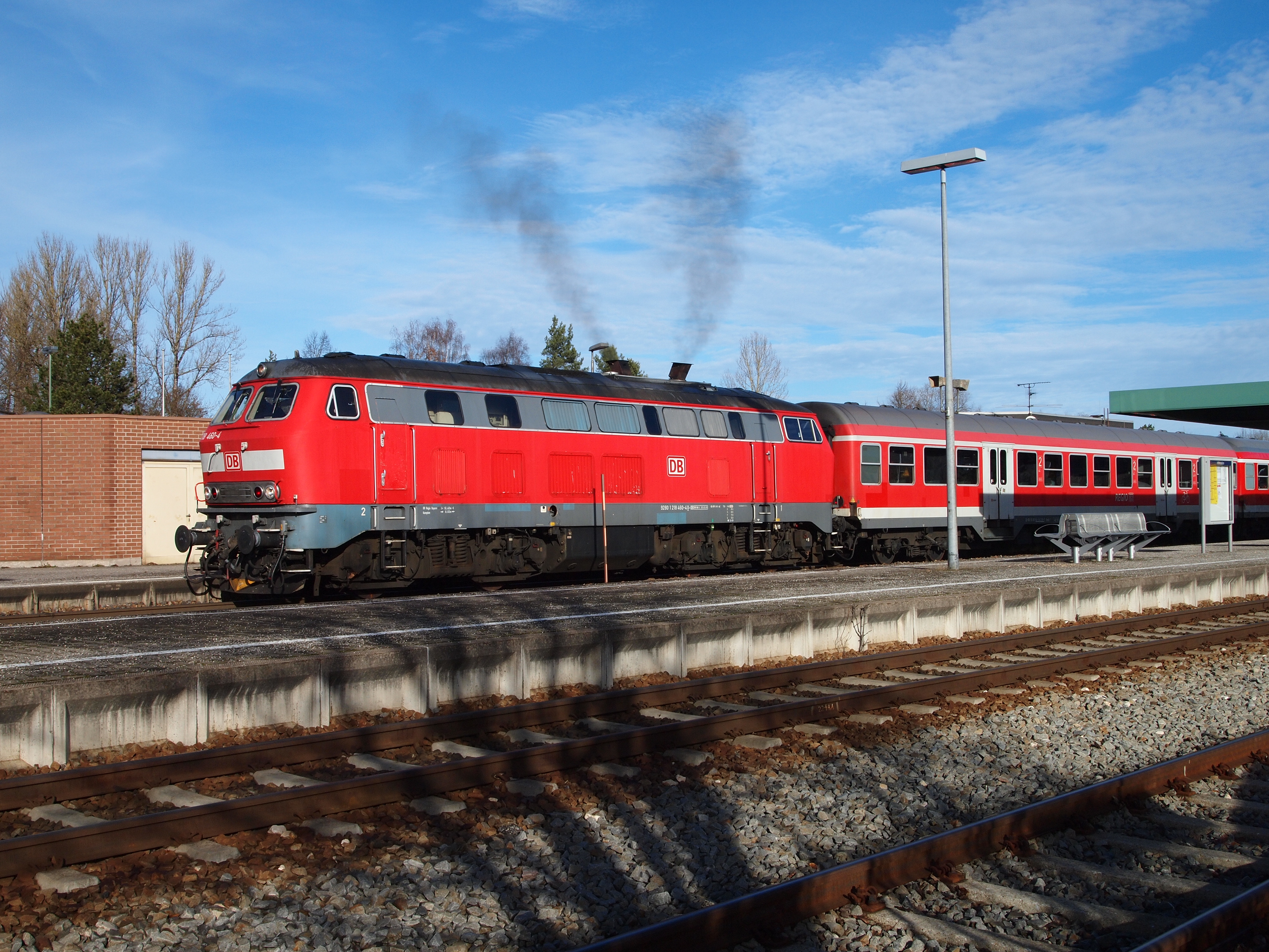 218 460-4 der Allgäubahn München Lindau bei der Abfahrt auf Gleis 1 im Bahnhof Kaufbeuren